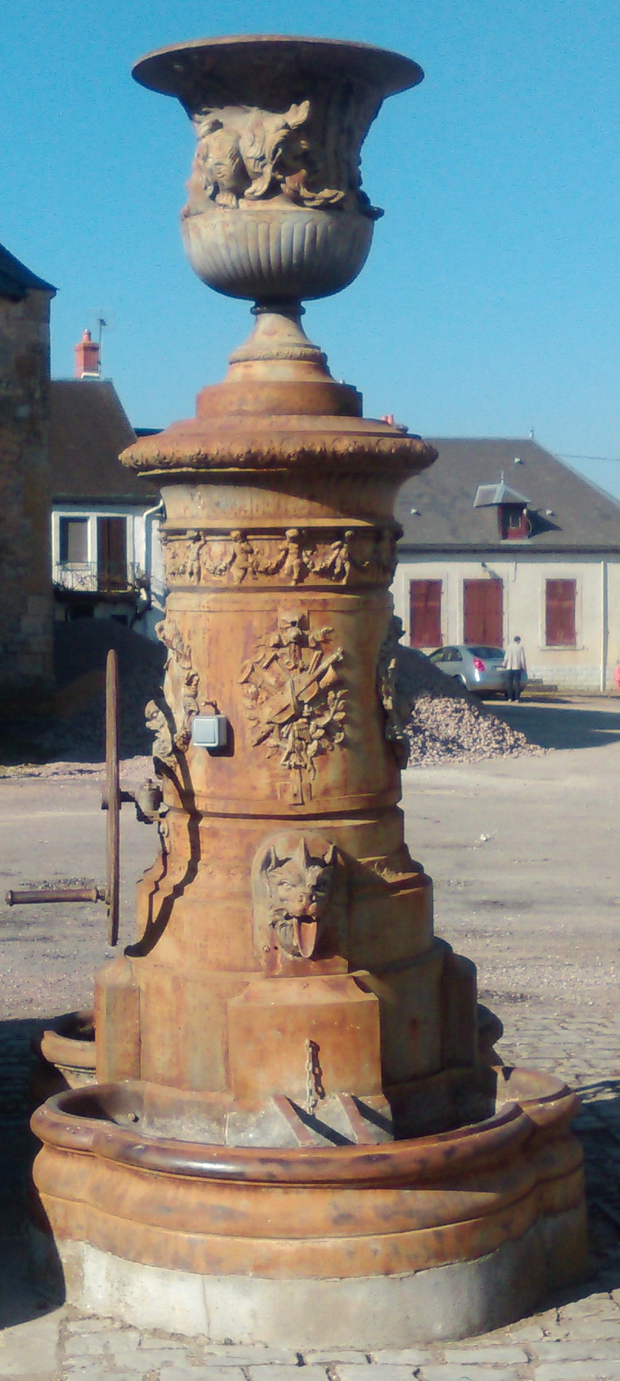 Fontaine proche de l'église